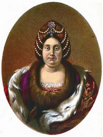 Семевский М.И. Очерки и рассказы из русской истории XVIII века. 3 тома. Царица Прасковья. - Слово и дело! - Царица Катерина Алексеевна, Анна и Виллим Монс. Спб., 1883-1884.